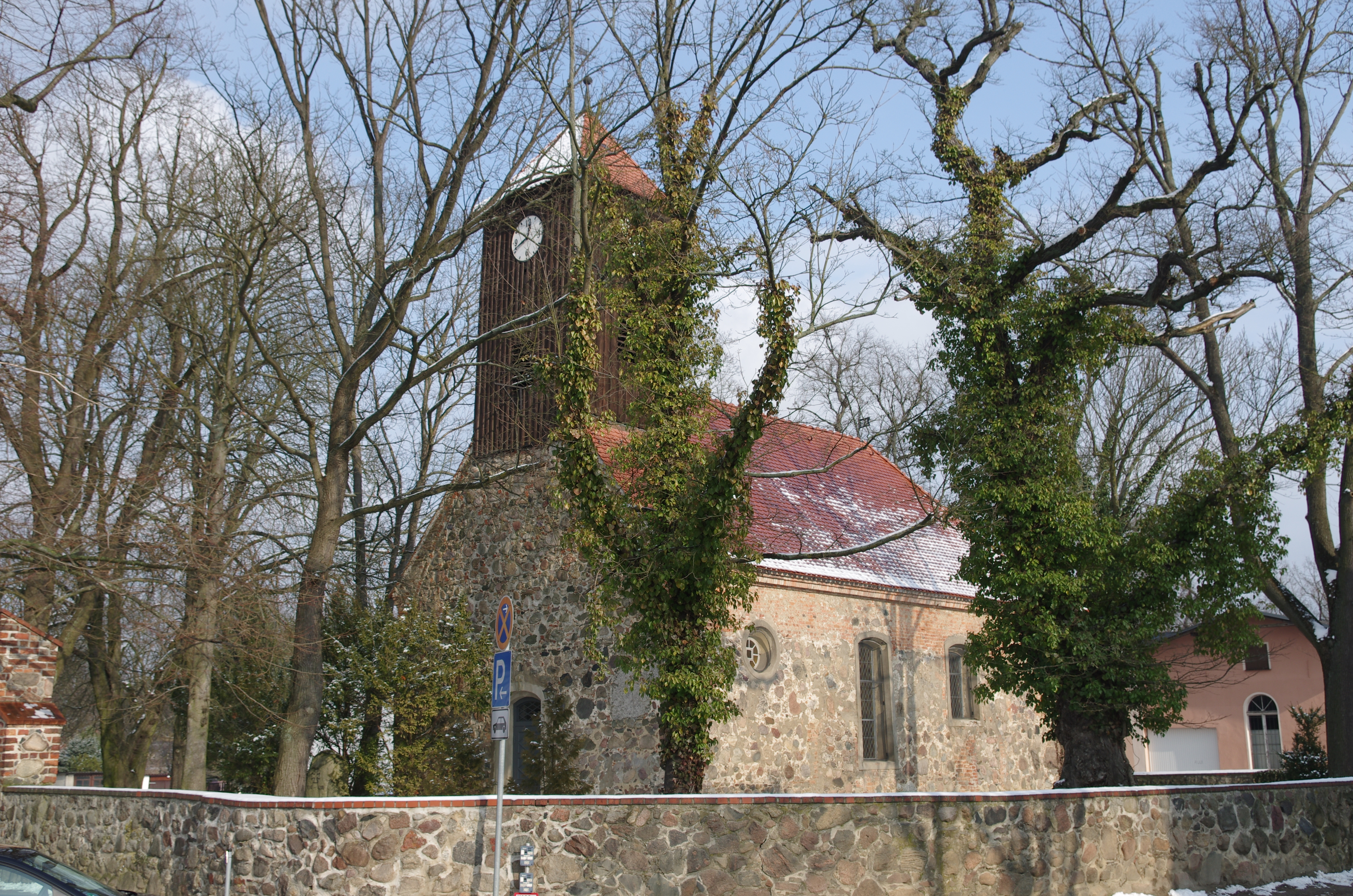 Zeuthen, Ortsteil Miersdorf in Brandendburg. Die Dorfkirche steht unter Denkmalschutz.